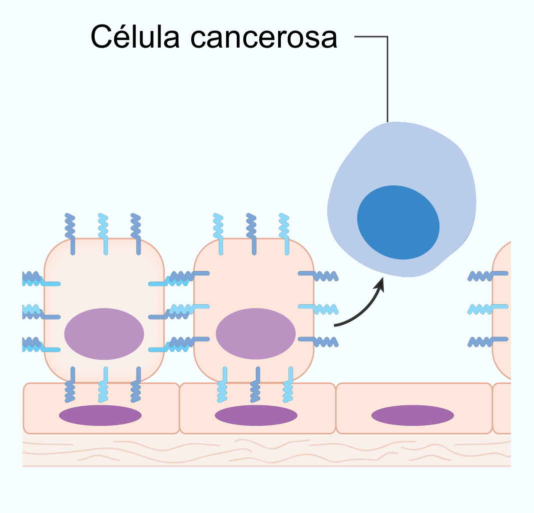 Esquema en el que se representa una célula cancerosa que ha perdido su adhesión a las células vecinas, lo que facilita el proceso de diseminación del cáncer.